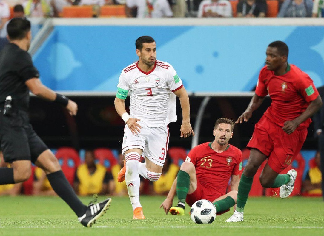 نیمه دوم بازی تیم‌های فوتبال ایران و پرتغال در جام جهانی ۲۰۱۸